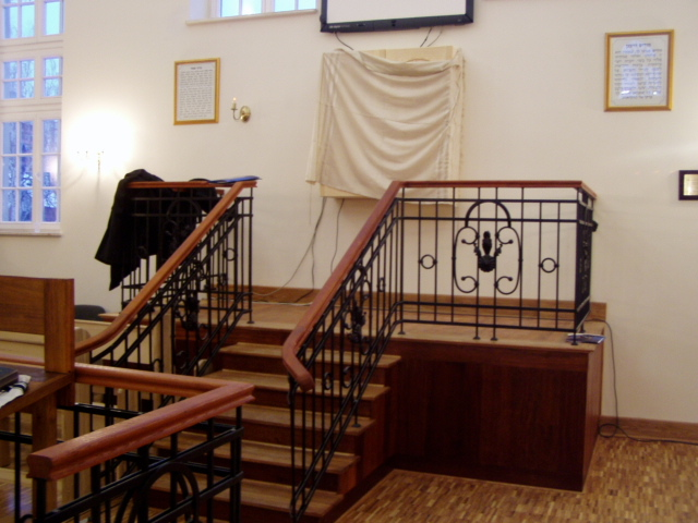 Synagogue in Jeszywas Chachmej Lublin